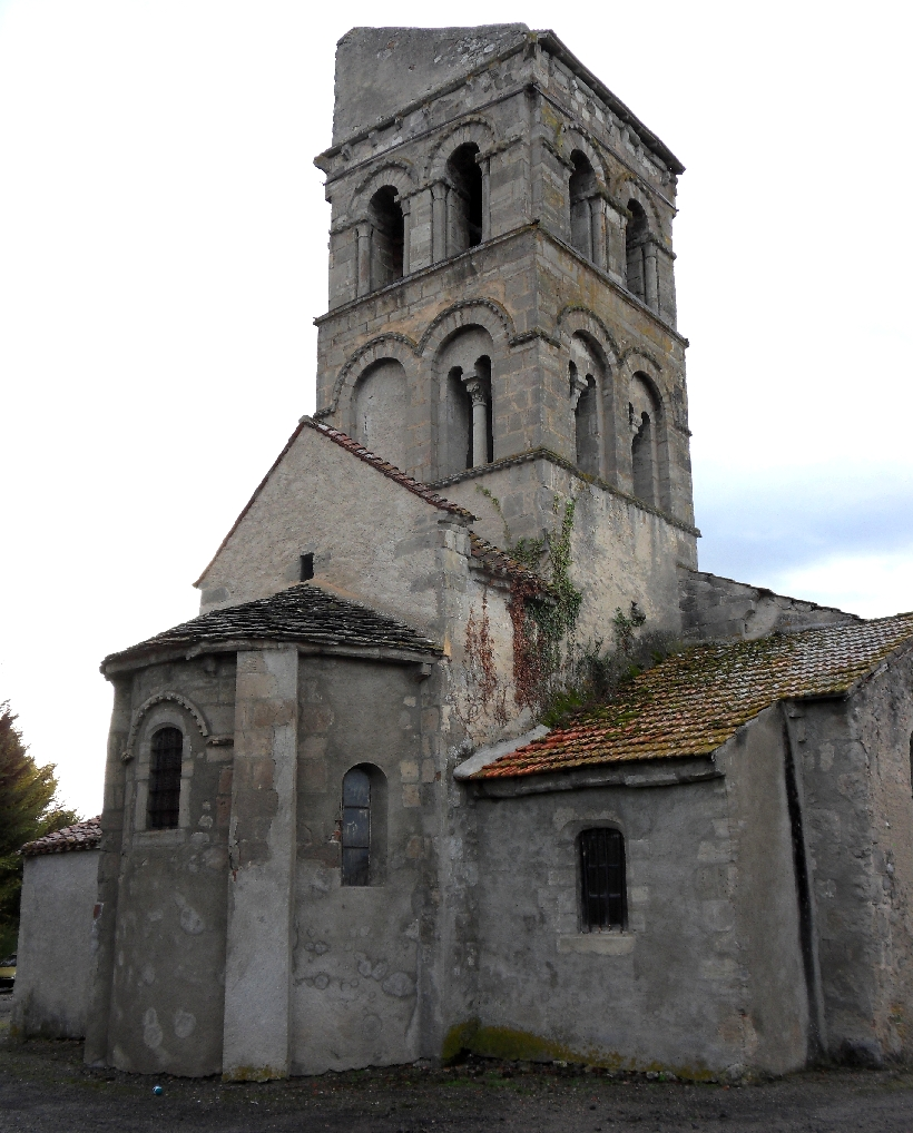 Église Saint-Martin (Inscrit) .